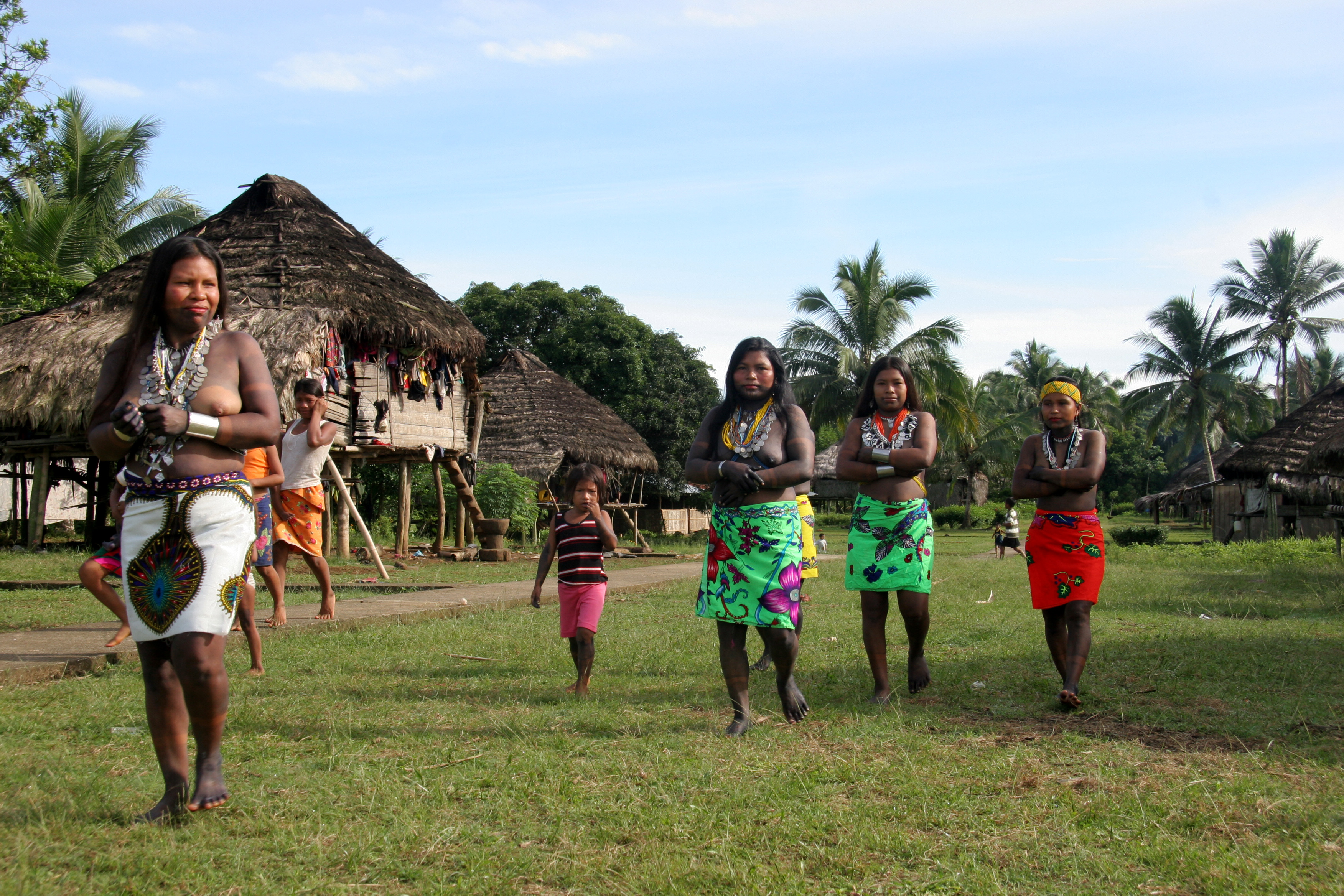 panama, darien, les femmes embera sont habillée pour une danse